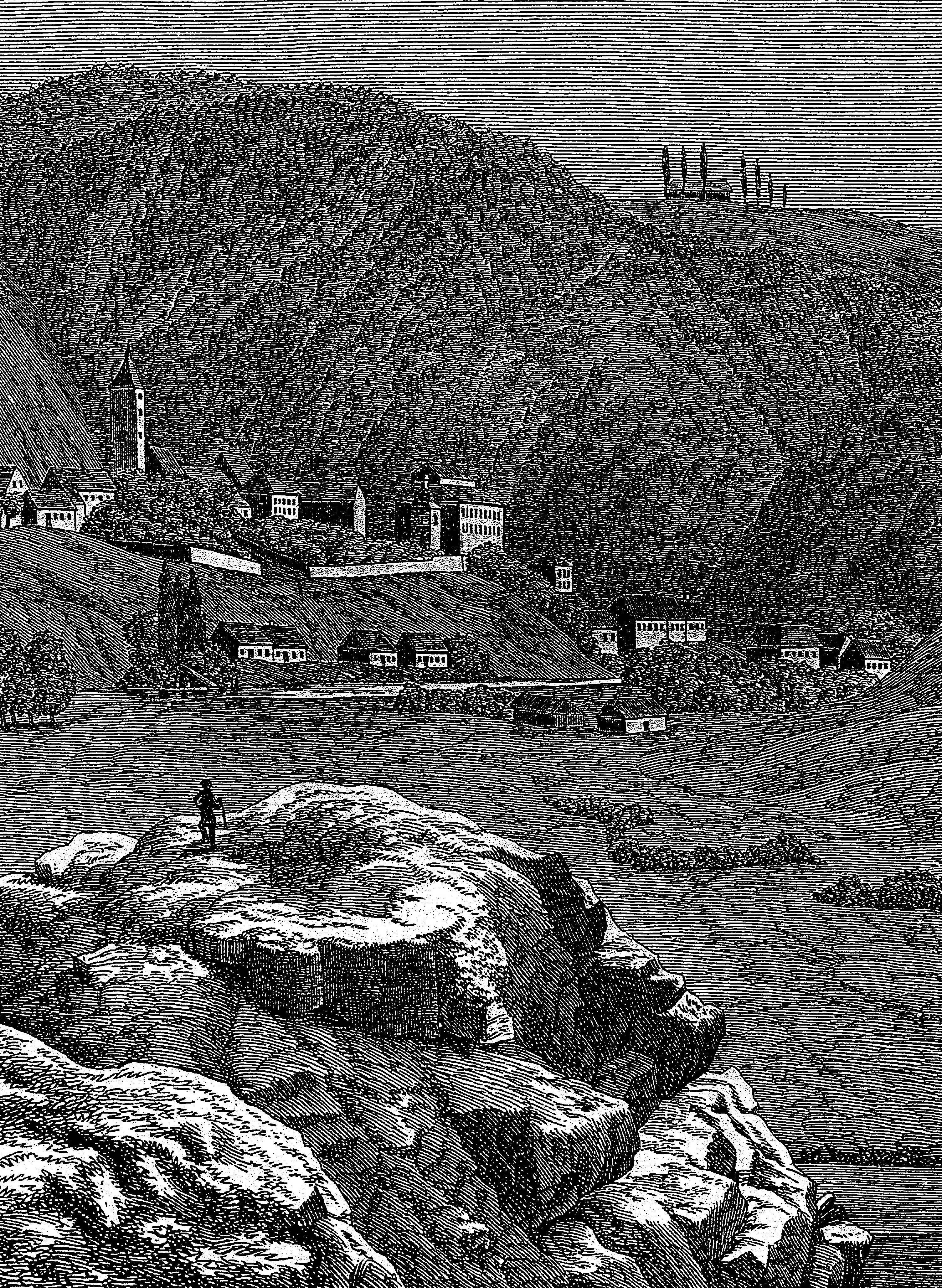 Pohled ze Starého hradu na Kácov, E. Herold, 1872